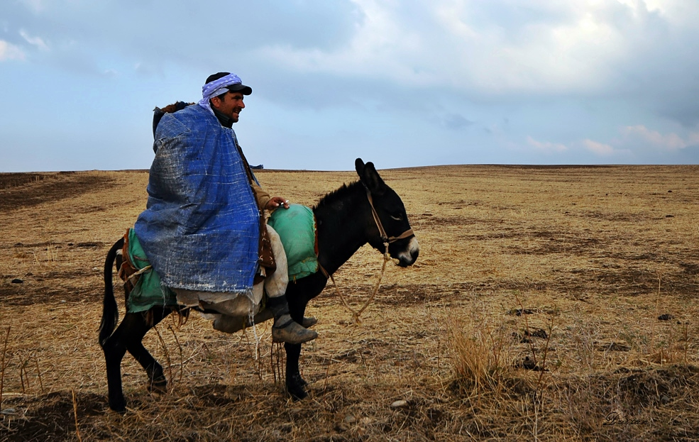 Kurdî: Ji Elodîna/Bismil